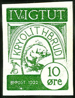 Почтовая марка местной почты Ивигтута (Гренландия)